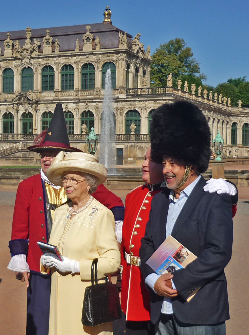 Die Queen (britische Schauspielerin Mary Reynolds) mit Wolfgang Stumph (Bobby) und Hofnarr Fröhlich im Zwinger